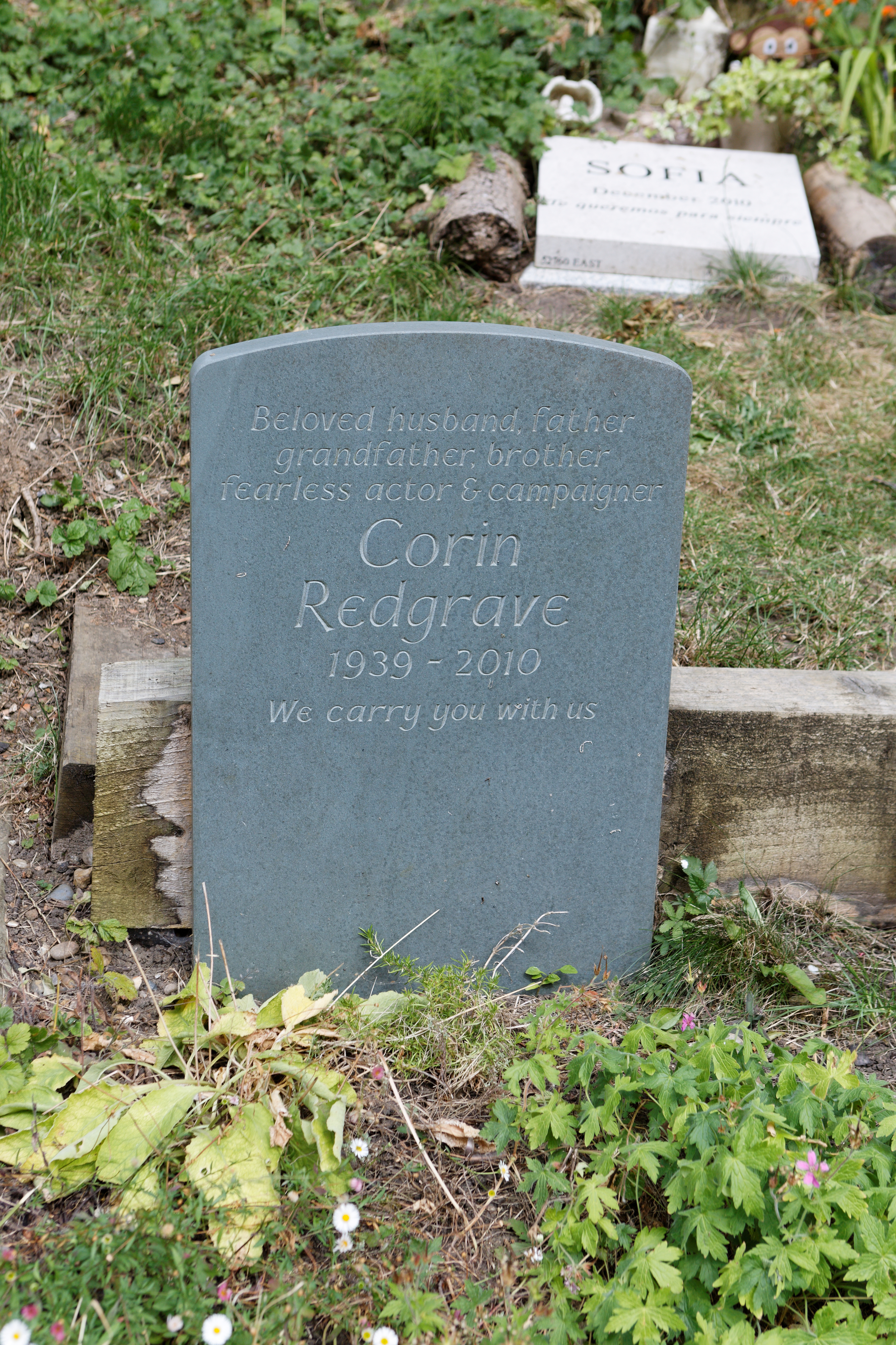 Sépulture de Corin Redgrave (1939-2010), acteur et militant politique britannique.